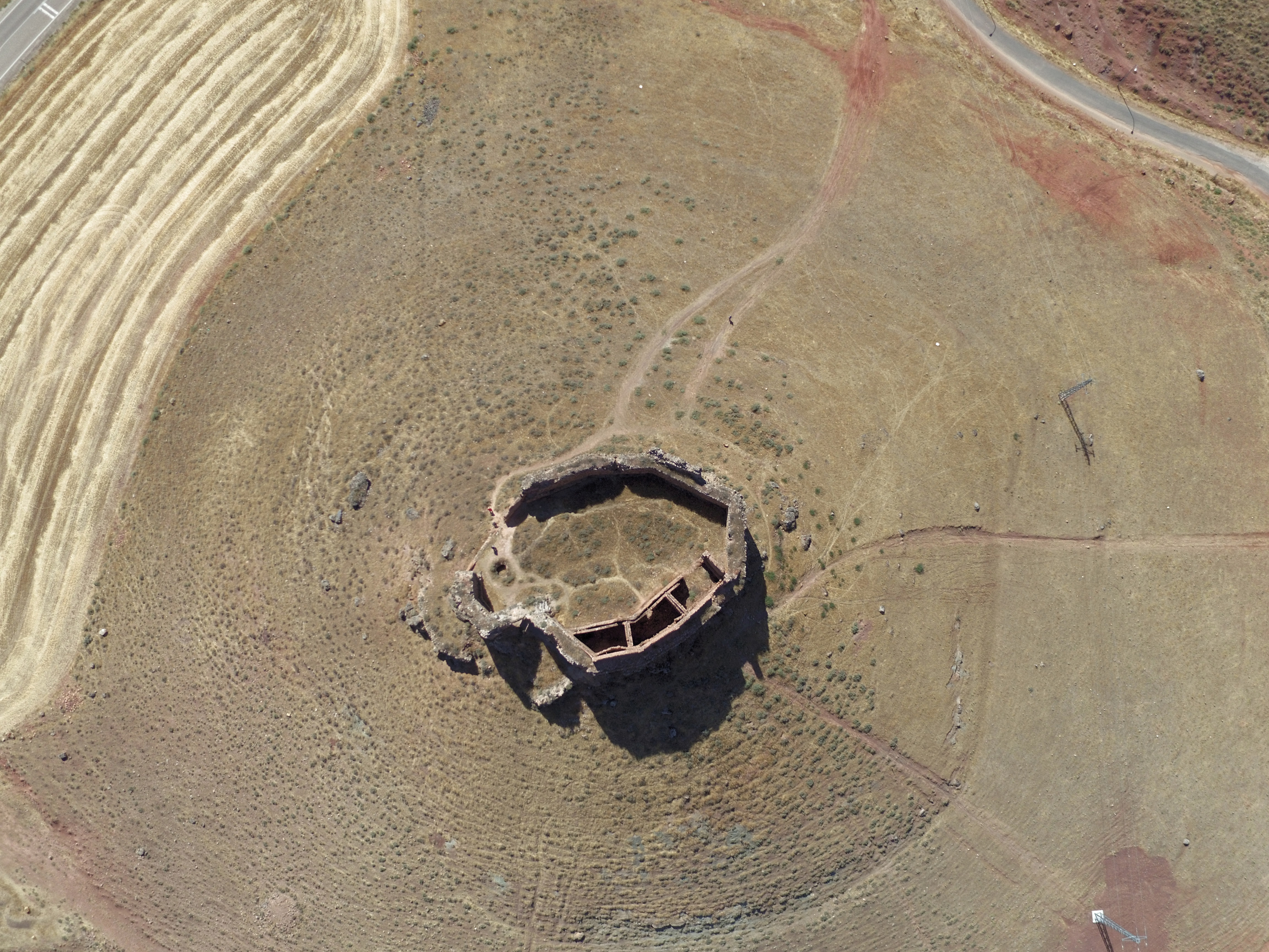 Castillo de Alhambra